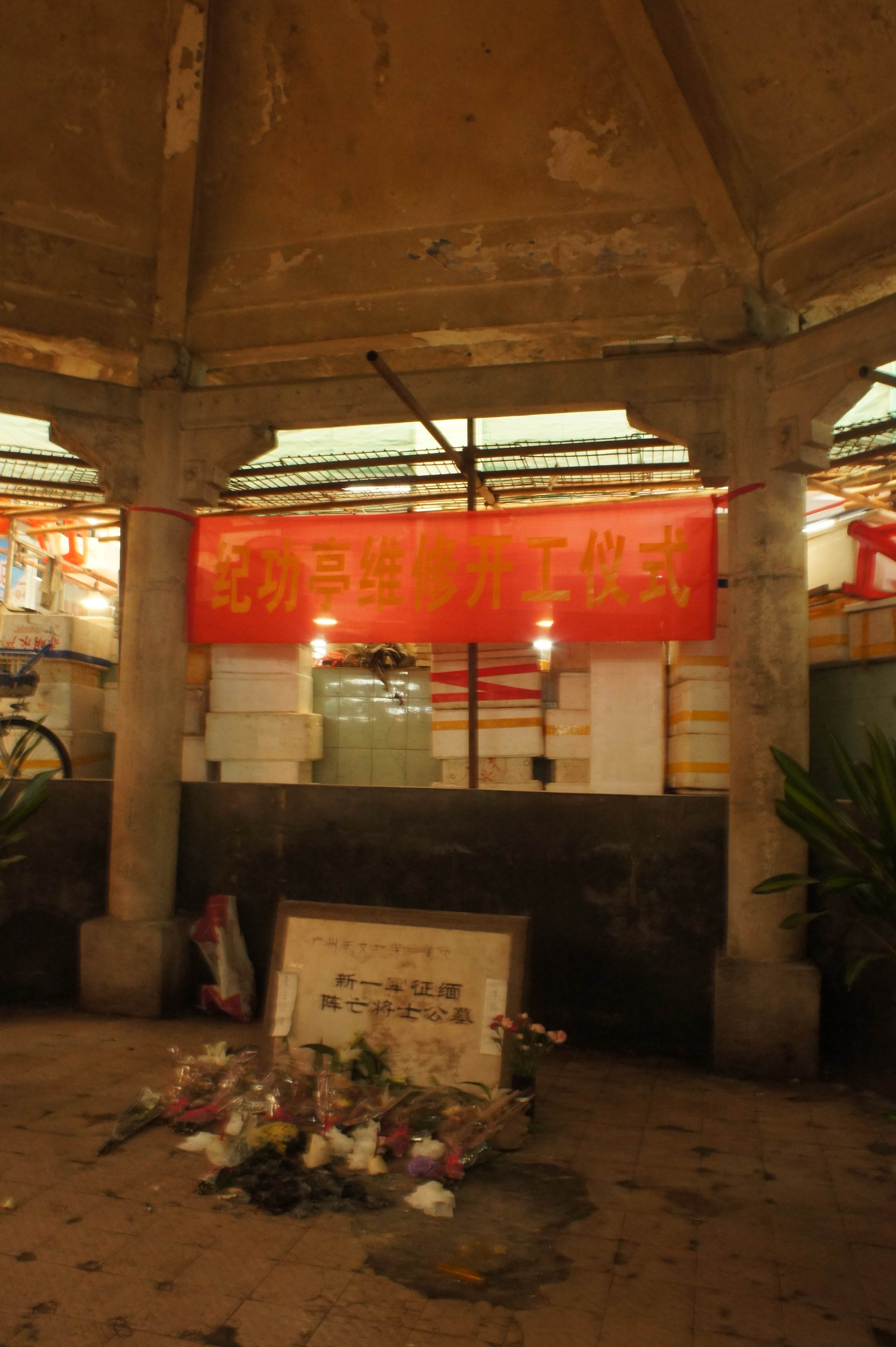 廣州市新一軍印緬陣亡將士公墓紀功亭（準備維修）